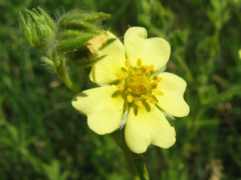 Aufrechtes Fingerkraut Potentilla recta, Müritz-Gebiet